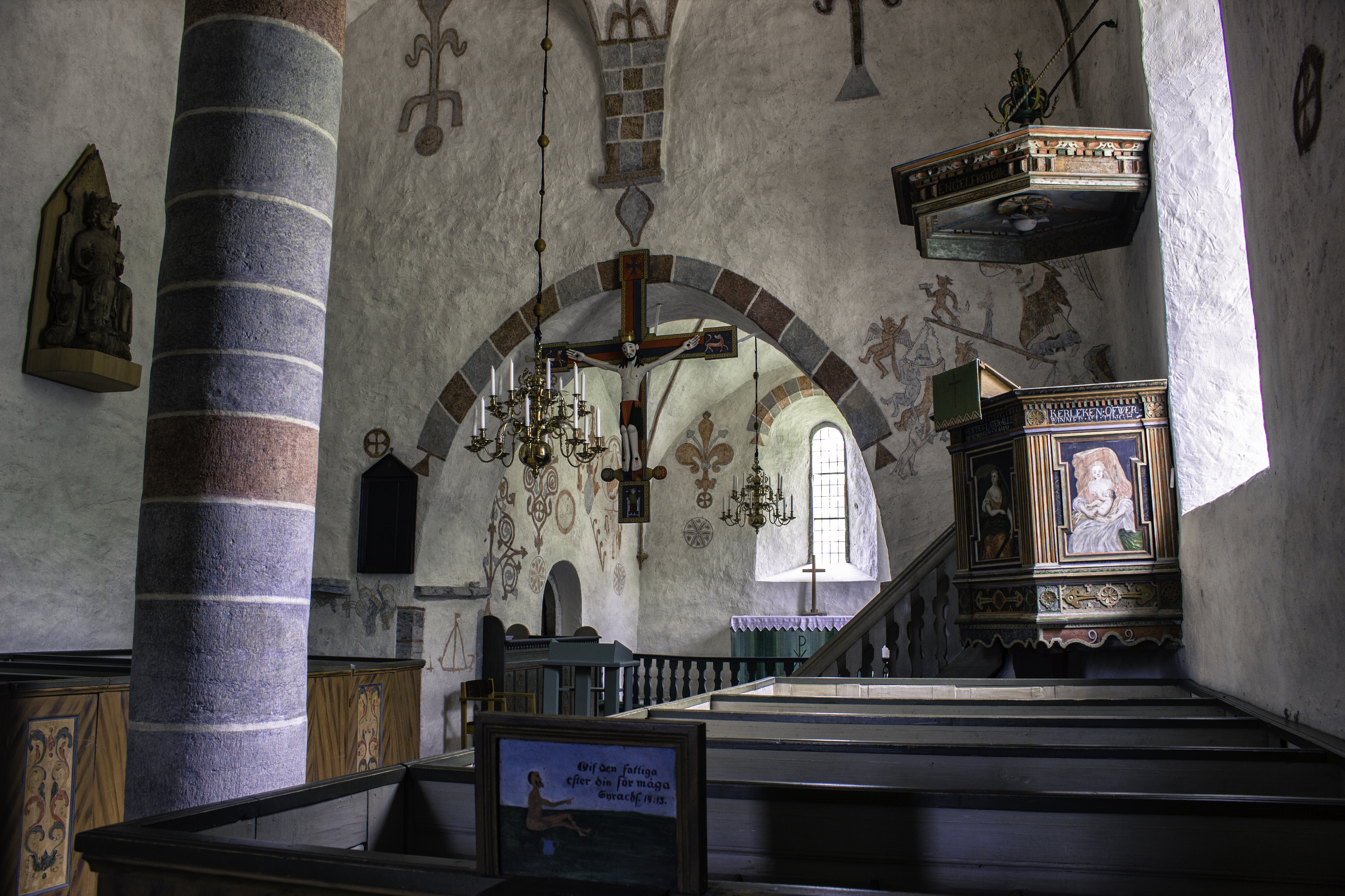 Interior da igrexa de Hall, na illa sueca de Gotland.